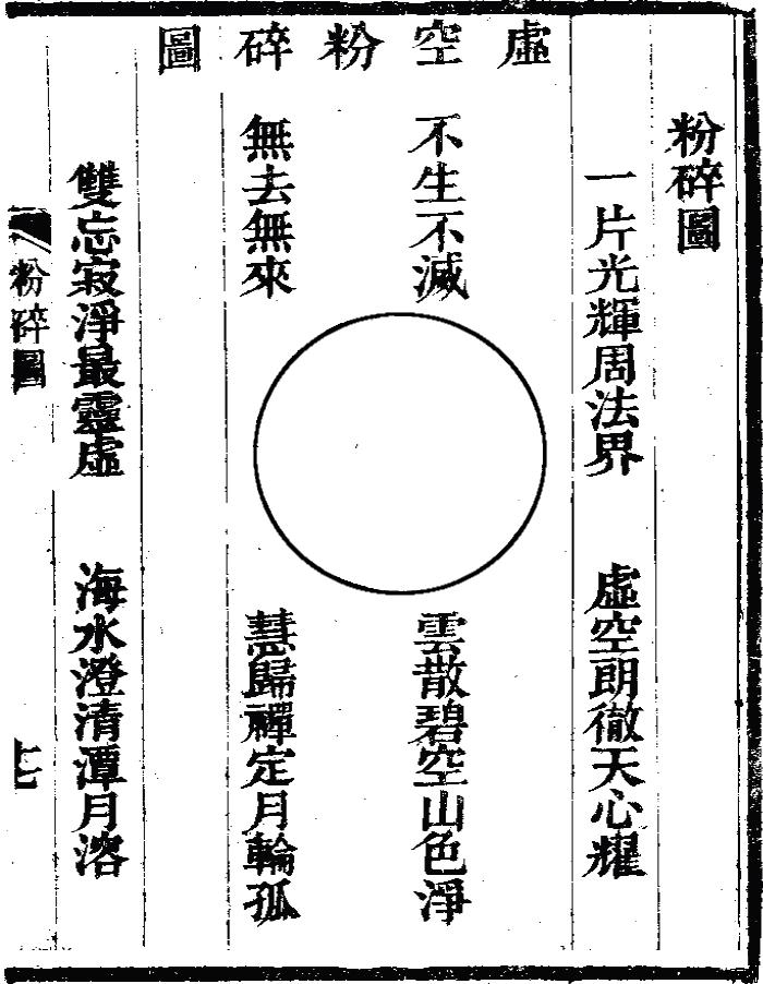 慧命經《虛空粉碎圖》